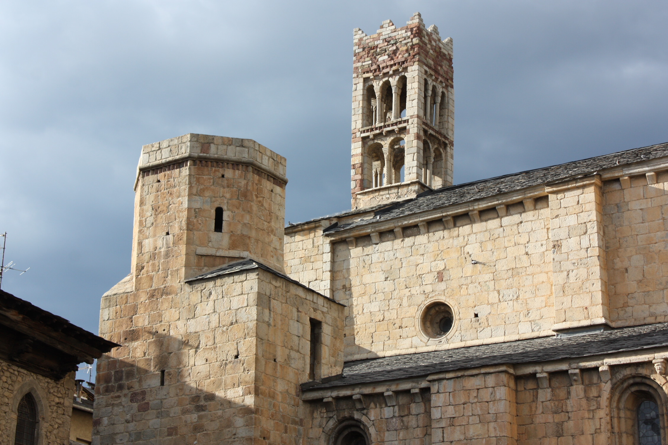 Torre de la façana de la Catedral d'Urgell